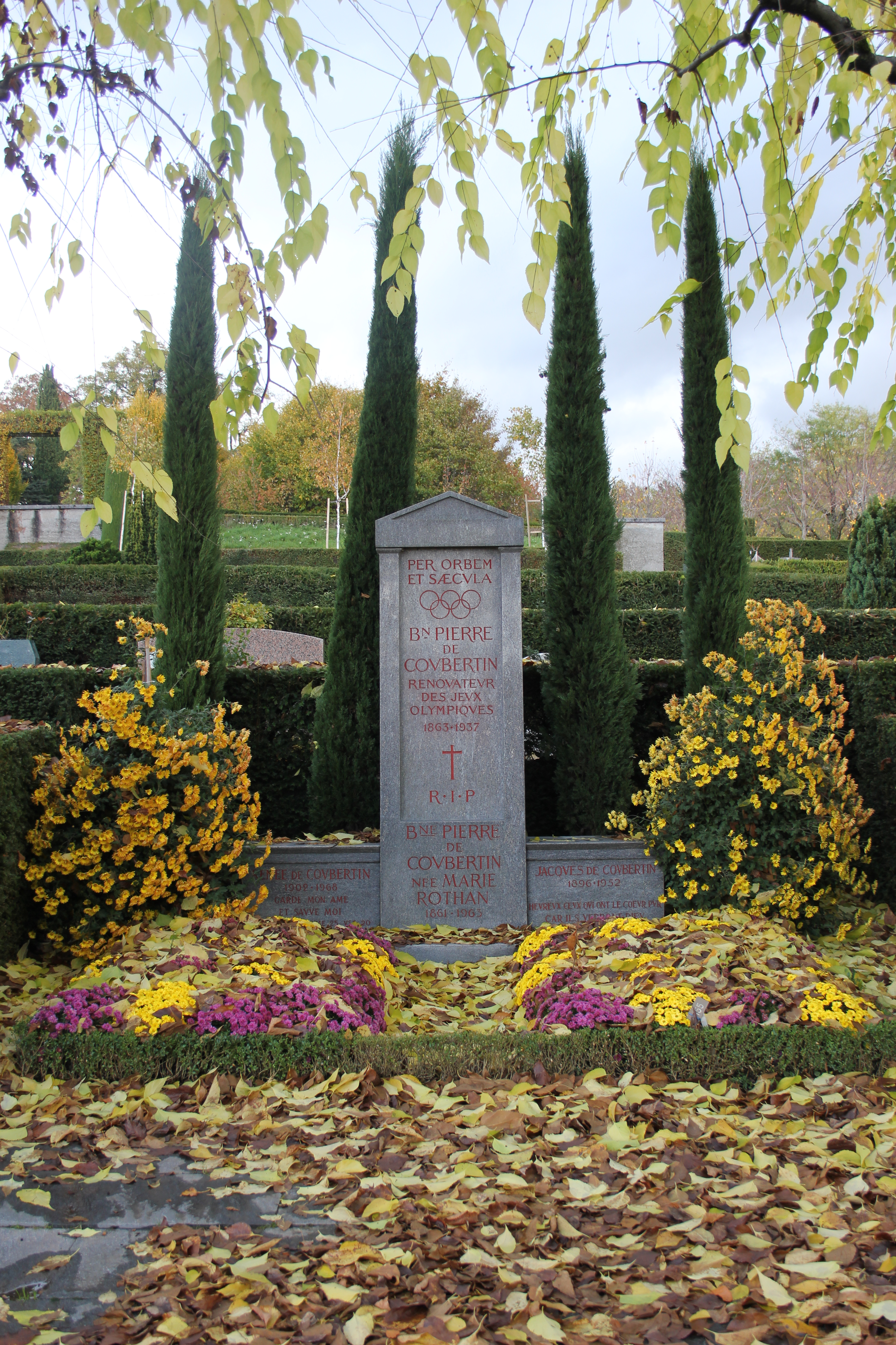 Pierre tombale - Pierre de Coubertin - Lausanne - Novembre 2013